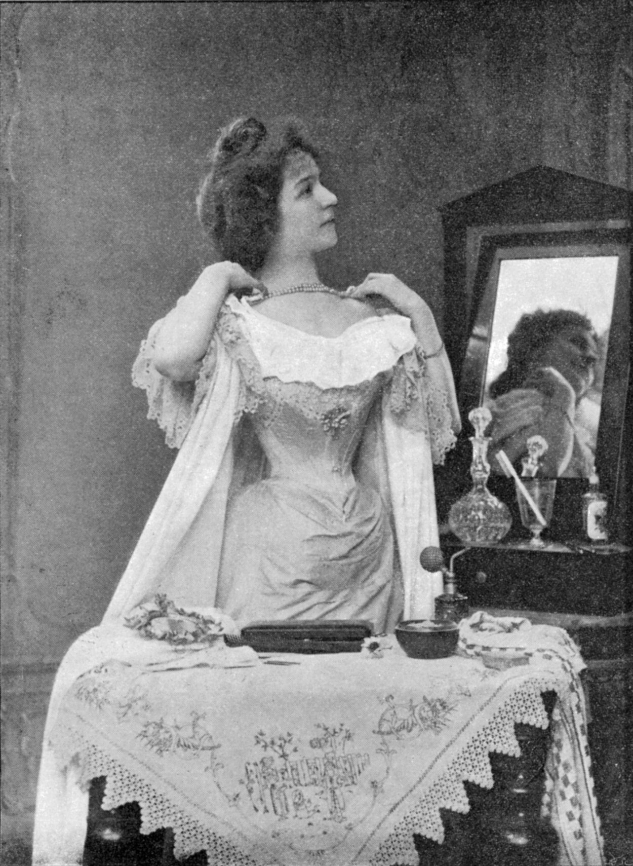 Die Pariserin bei ihrer Toilette; Die Toilette einer eleganten Pariserin ist ein sehr wichtiges Geschäft, das mit aller Sorgfalt und unter Widmung des gehörigen Zeitaufwandes besorgt werden will. An dem guten Willen fehlt es nie, denn die Toilette war seit jeher eine Lieblingsbeschäftigung der Pariserin und ist es bis zu dem heutigen Tag geblieben. Unsere Abbildungen lassen einige der wesentlichsten Phasen der Toilette verfolgen, von dem Augenblicke, wo die Pariserin zu ihrem Waschtisch tritt, um ihr Schönheitswerk zu beginnen, bis zu dem Schluss, den die Anlegung des Perlenhalsbandes bezeichnet. Man frage nicht, wie lange die Vollendung des Kunstwerkes gedauert, als welches die Toilette einer Pariserin sich darstellt.